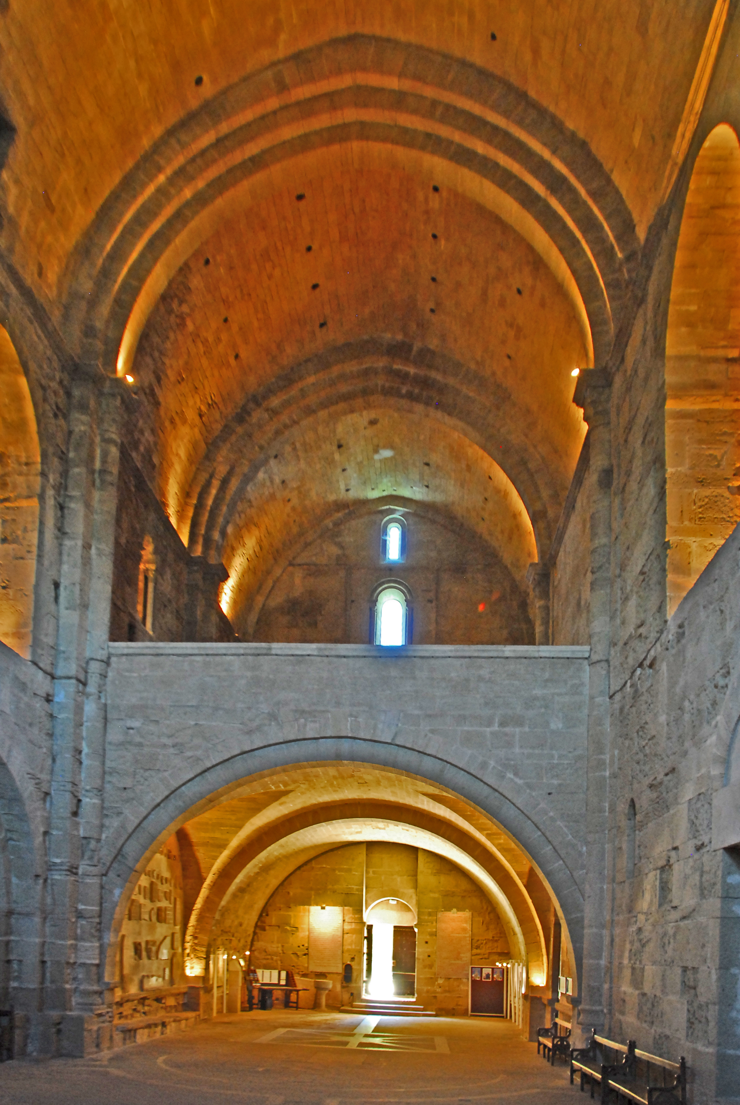 St-Pierre-et-St-Paul de Maguelone, Empore, vom Chor aus